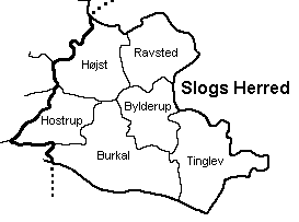 Slogs Herred, Tønder Amt, Danmark.